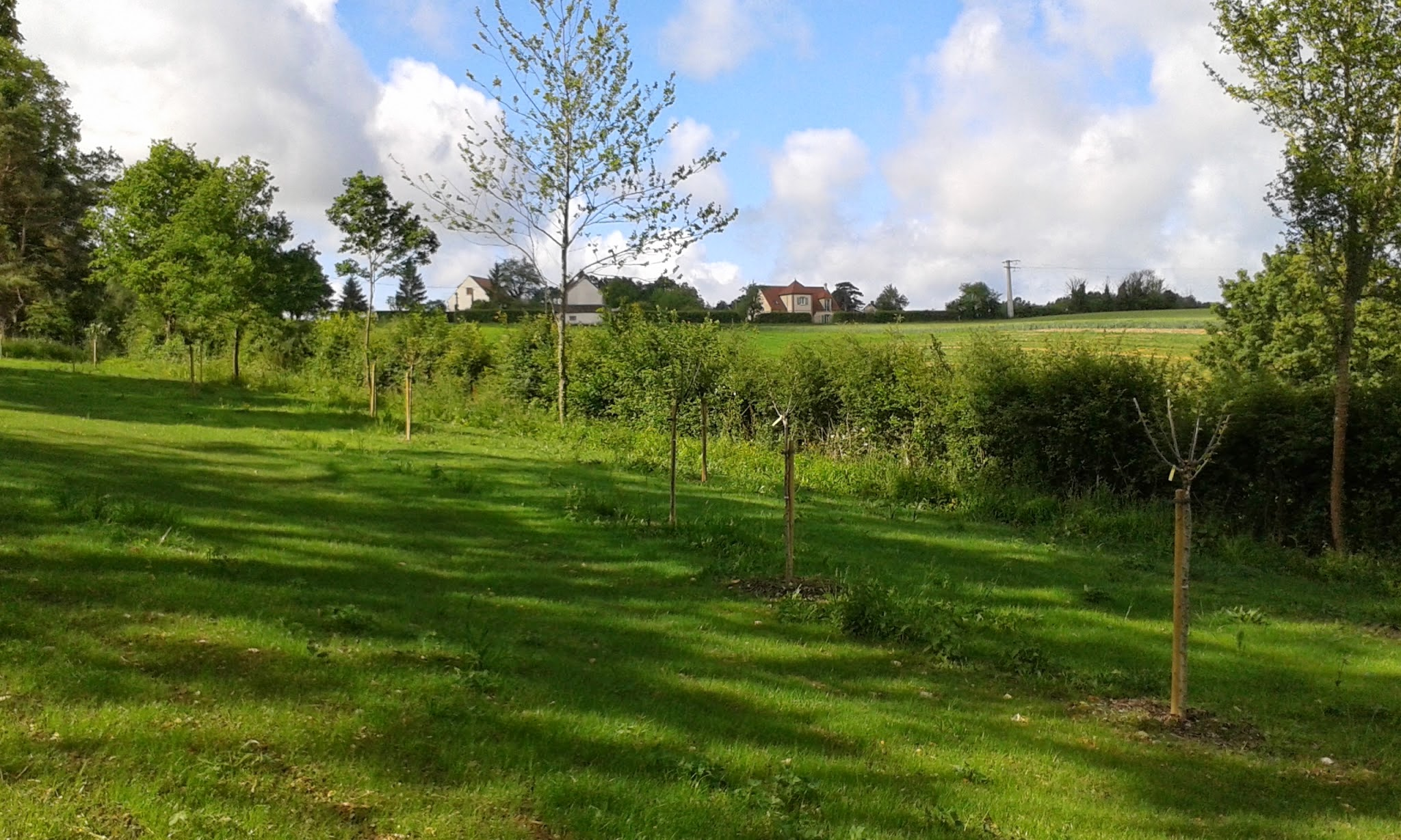 Verger Conservatoire de St Aubin Château Neuf (89) 1ére année de Plantation